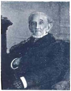 Fotografía del escritor e historiador uruguayo Isidoro de María